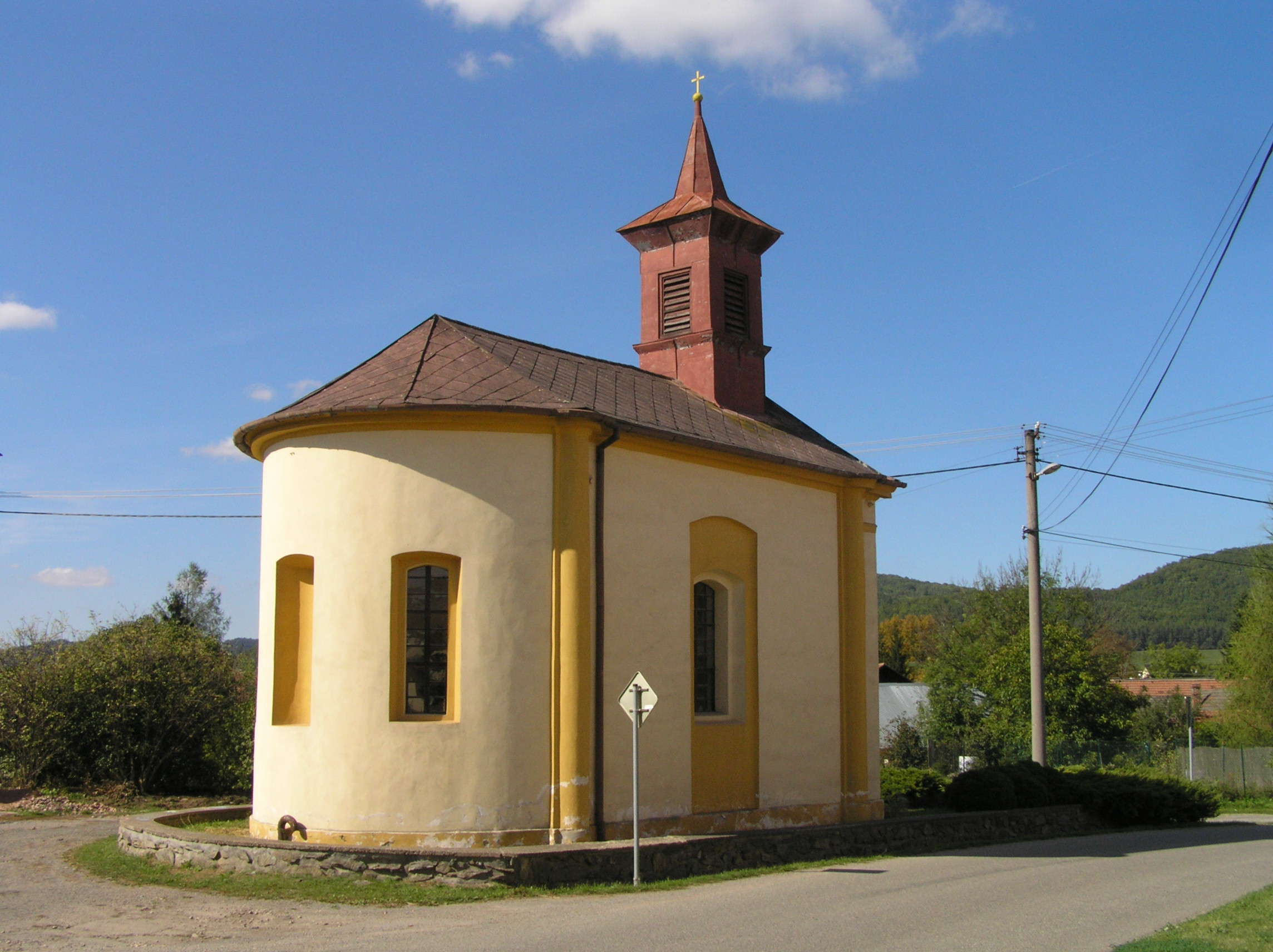 Kaplička sv. Bedřicha v Lomničce (okres Brno-venkov)